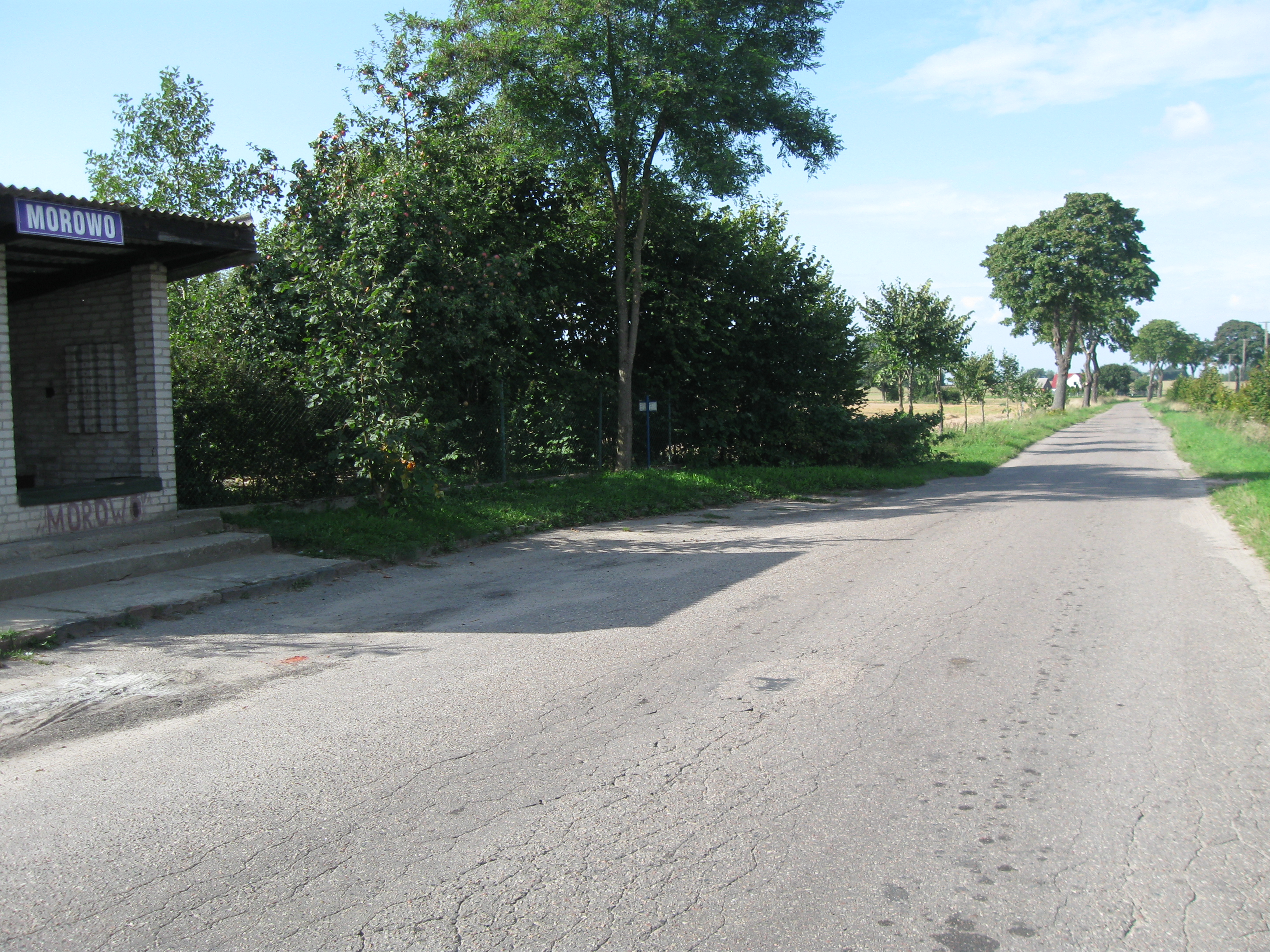 Centrum Morowa - widoczny przystanek i droga do Byszewa